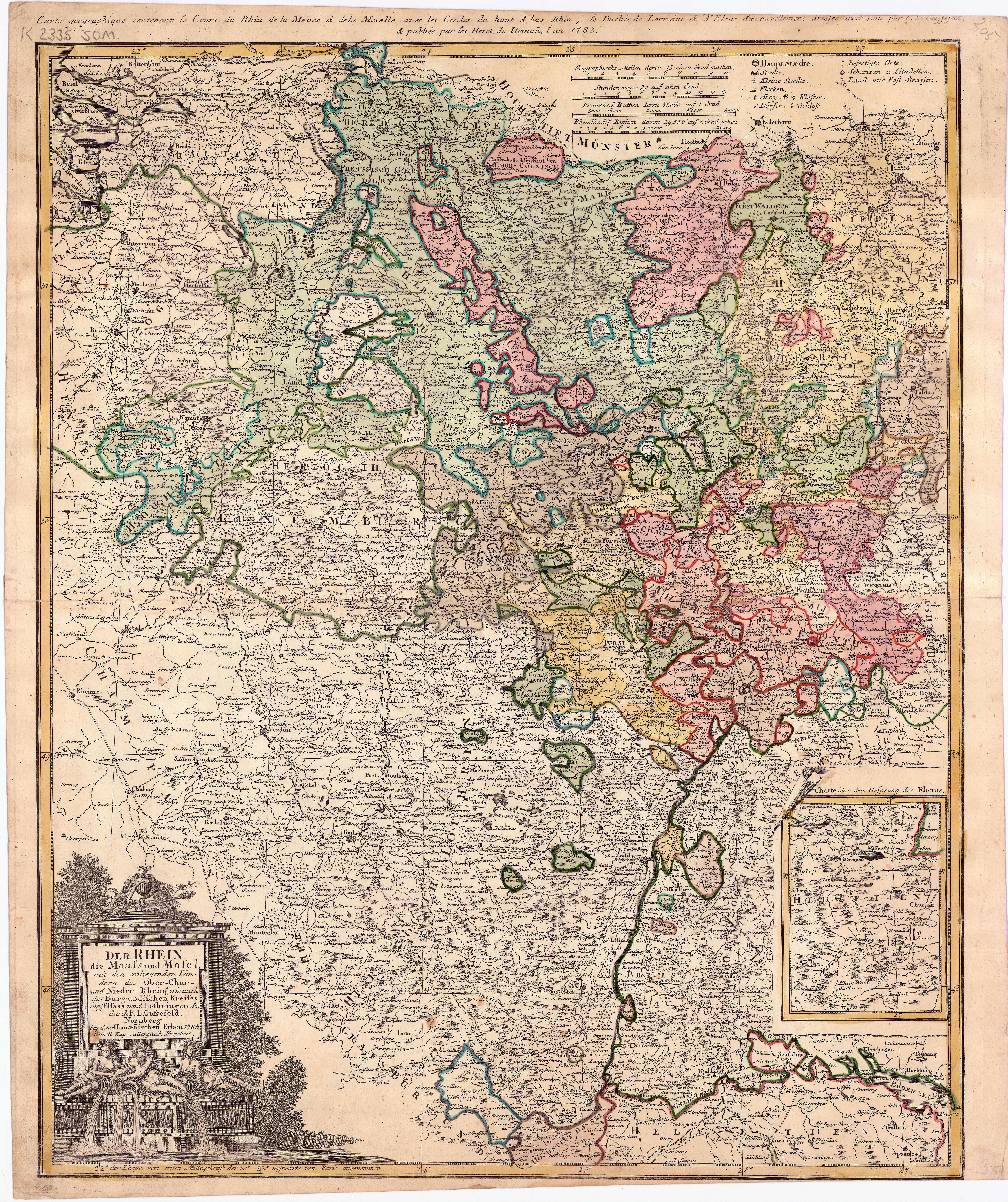 Nürnberg : Homännische Erben, 1783; [Electronic ed.] Koblenz : Landesbibliothekszentrum Rheinland-Pfalz, 2010.